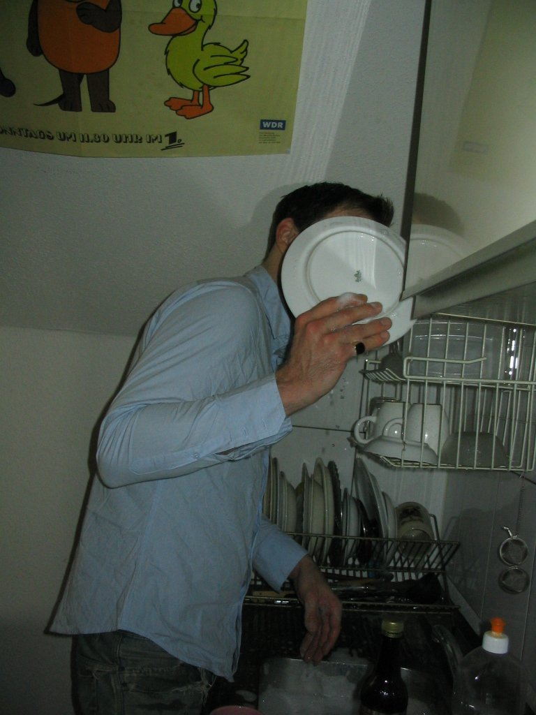 Dishwashing